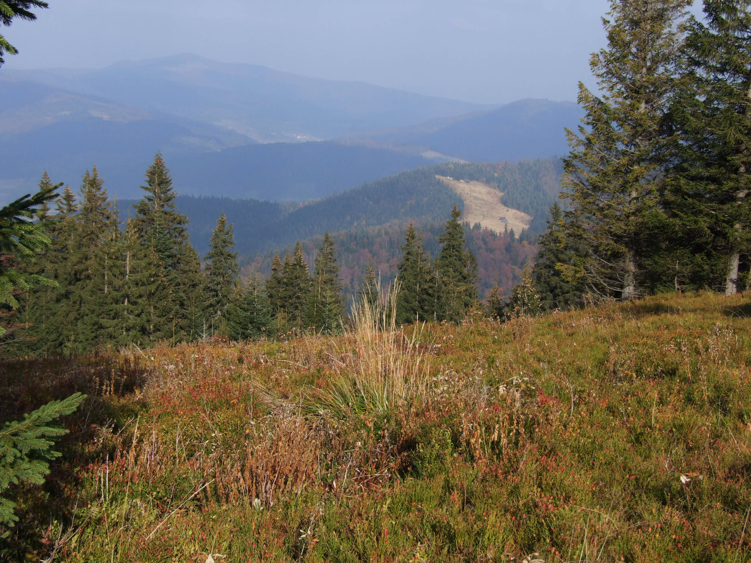 Widok zpolany Kudłoń na polanę Podskały i Beskid Wyspowy